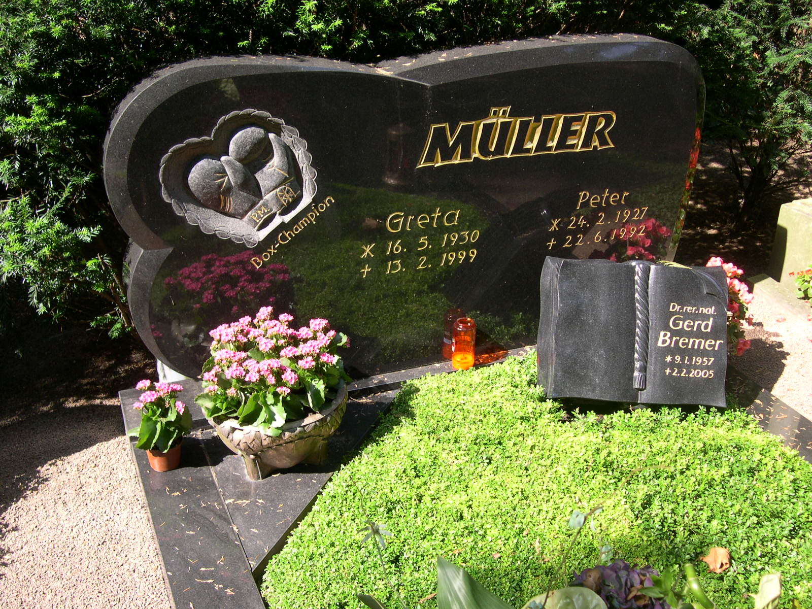 Grabstein des Boxers Peter Müller auf dem Südfriedhof Köln